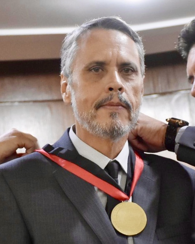 A Câmara Municipal de João Pessoa concede a Medalha Cidade de João Pessoa ao deputado Ariano Fernandes por relevantes serviços prestados à capital paraibana